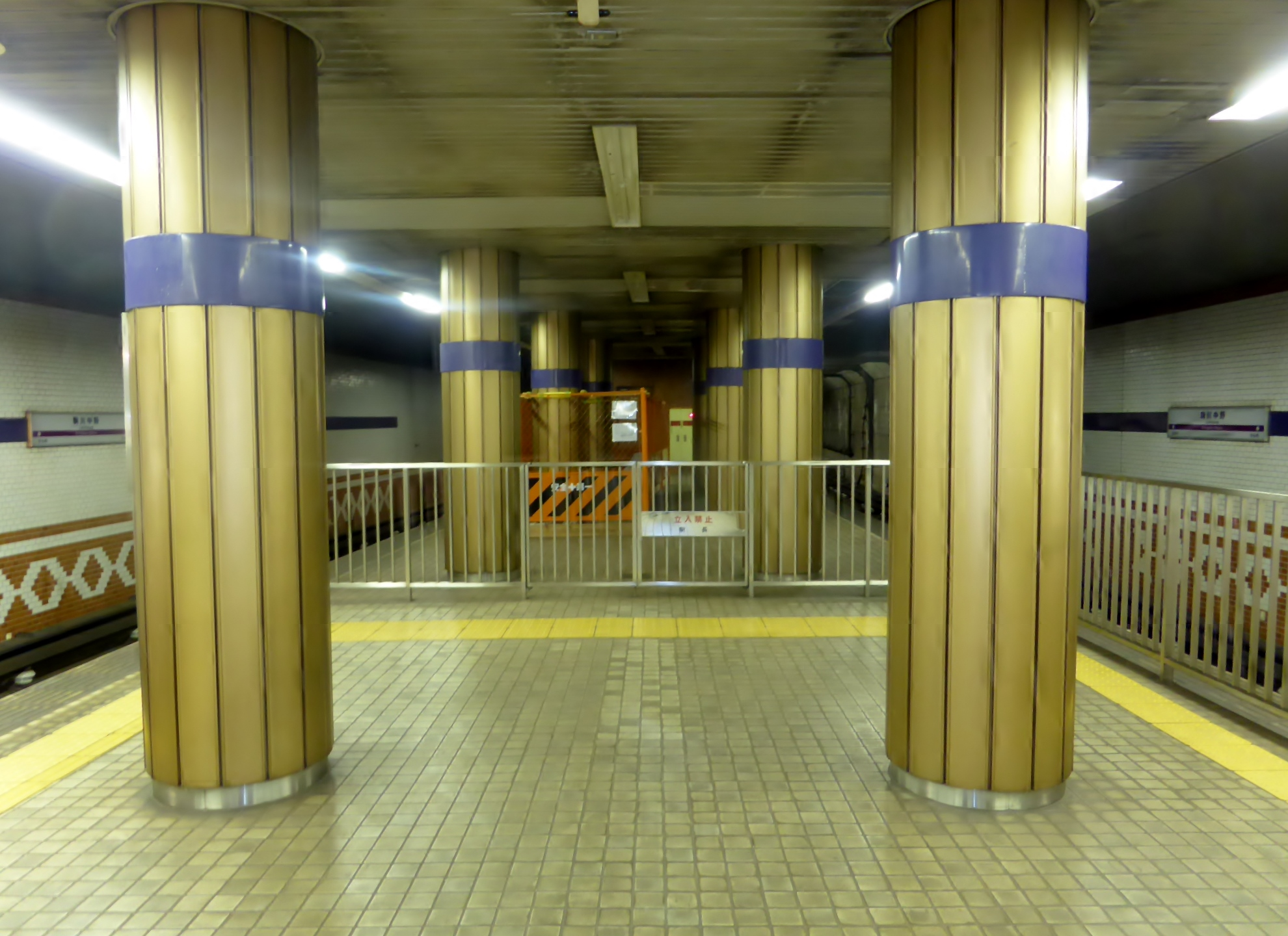 駒川中野駅ホームを撮影。